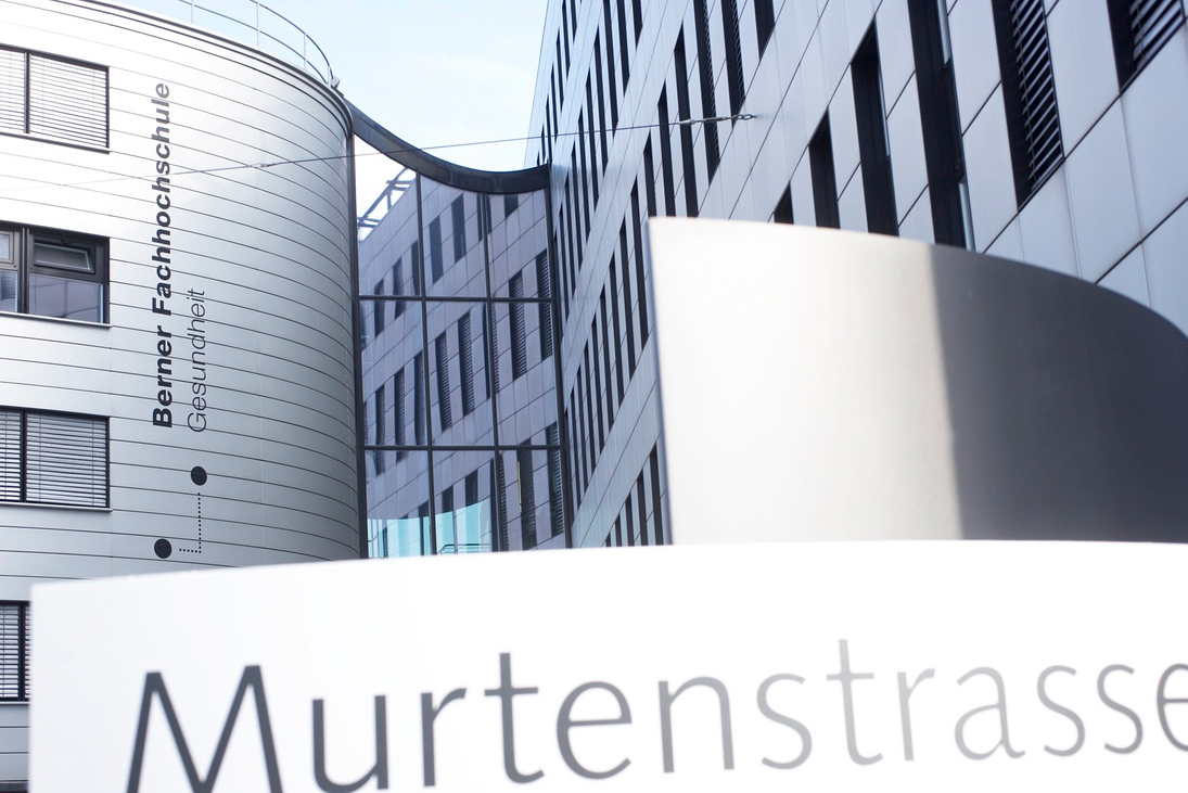 Gebäude des Fachbereichs Gesundheit der Berner Fachhochschule an der Murtenstrasse 10 in Bern.